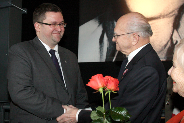 Jan Ołdakowski i Edmund Baranowski ps. Jur podczas nadania Honorowego Członkostwa Związku Powstańców Warszawskich